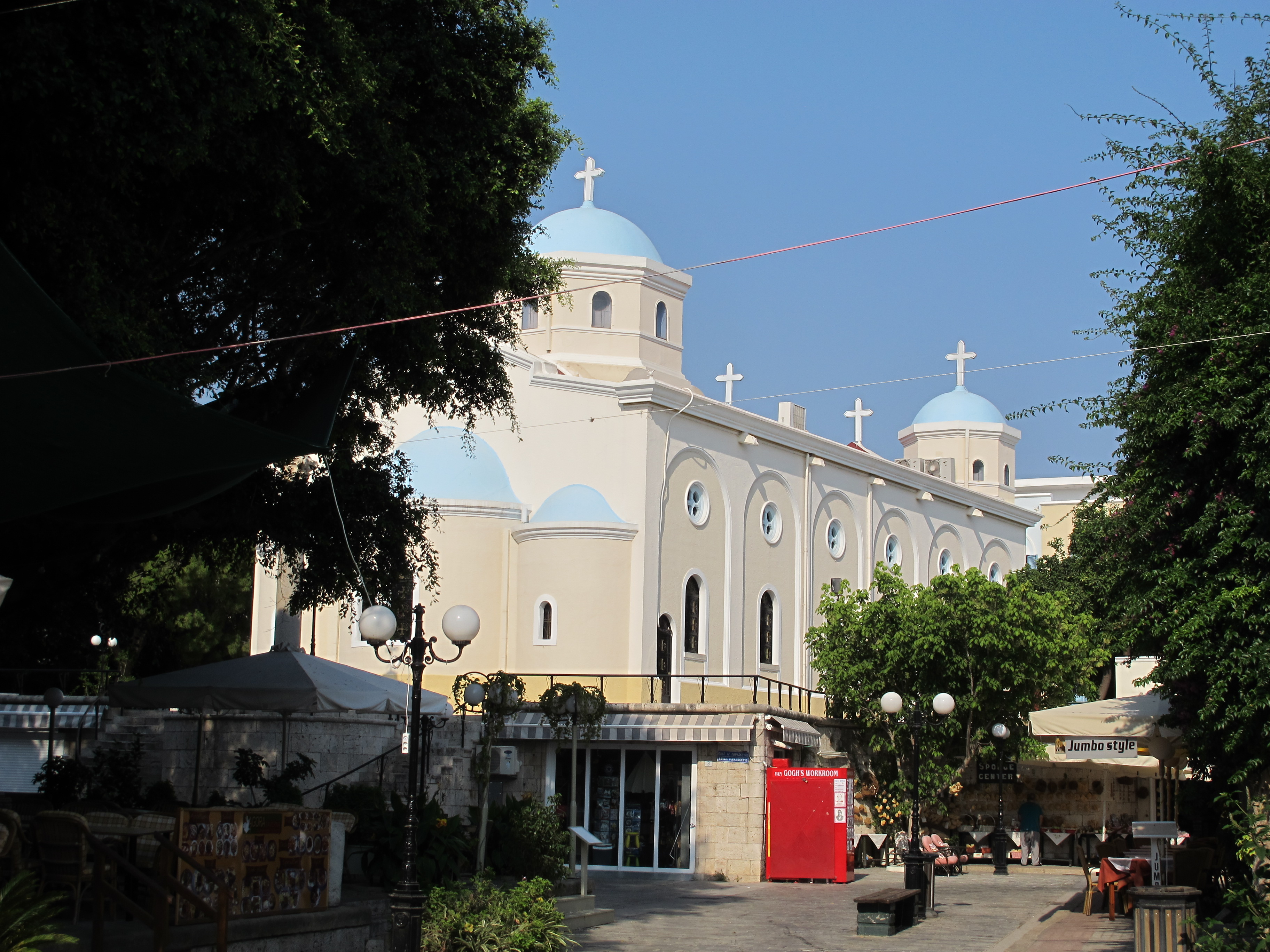 Kos città, piazza eleftherias, chiesa ortodossa di Agia Paraskevi